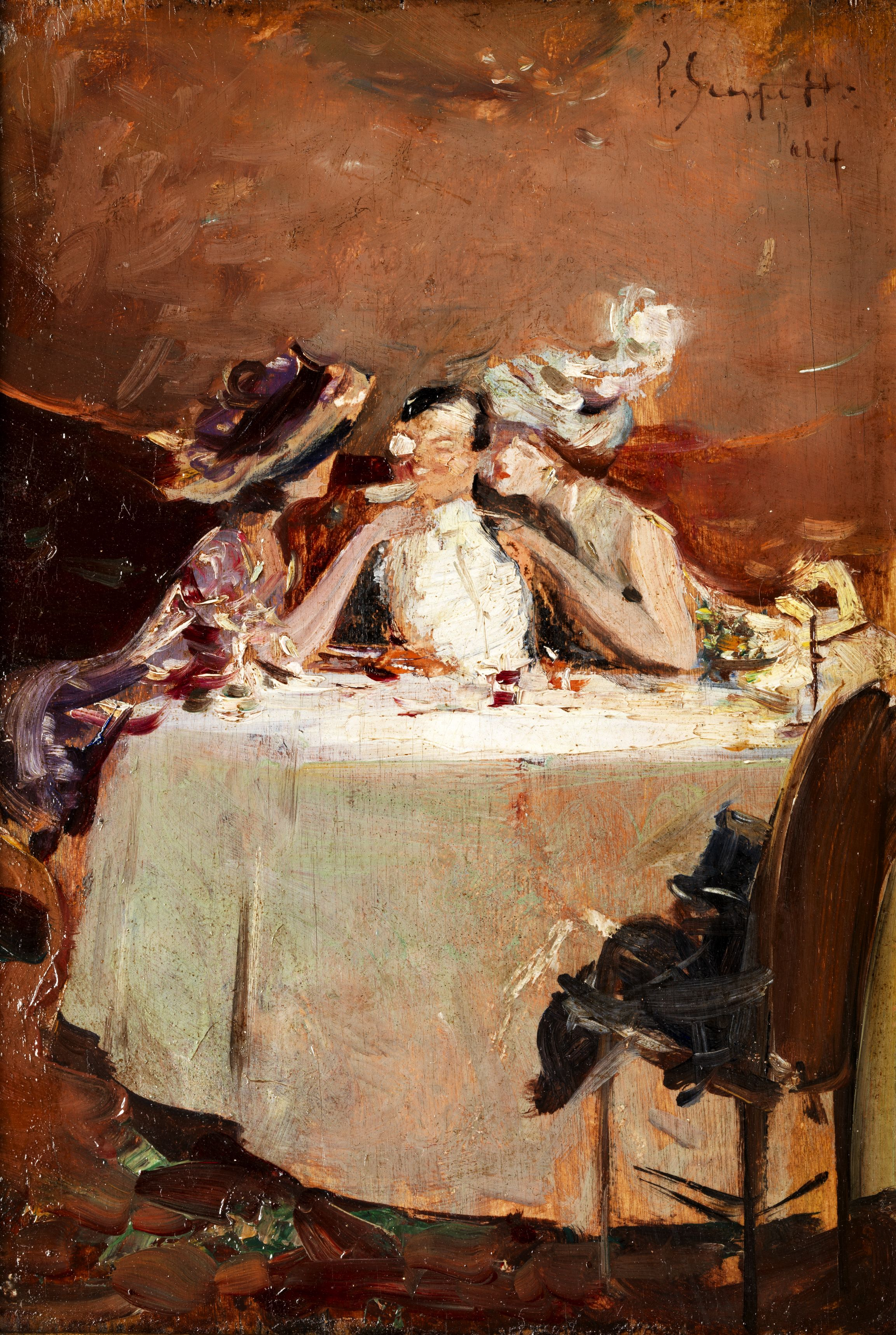 Im Café.